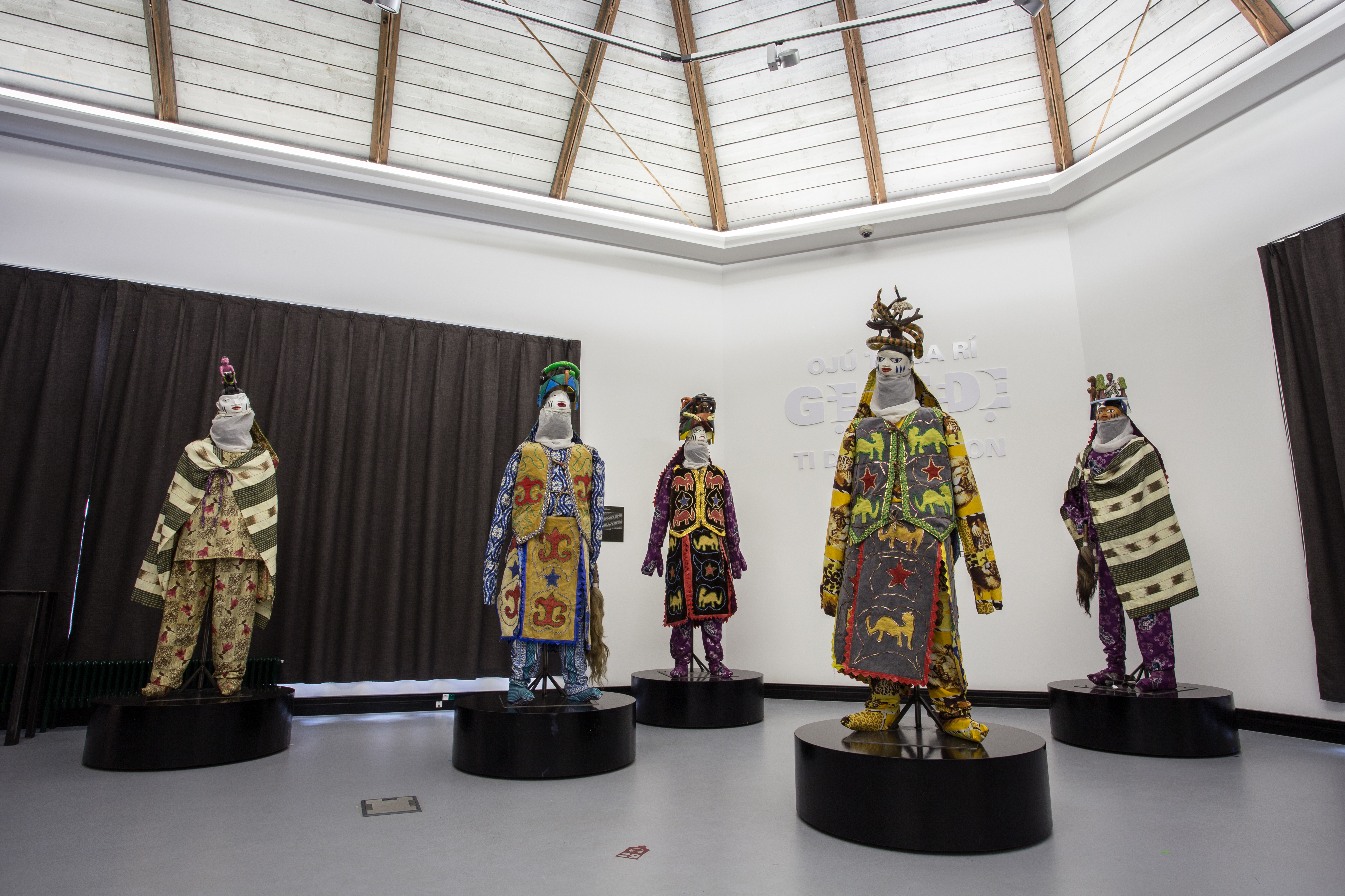 Le Gèlèdé, Gèlèdè, ou Guèlèdé, est une cérémonie pratiquée par la communauté Yoruba-Nago établie dans la région Yoruba-Nago au Bénin, au Nigeria et au Togo. Des chants en langue yoruba, de la musique par quatre tambours et des danses masquées ont lieu à la fin des récoltes, et lors d'événements importants comme certaines naissances, certains décès, et mariages ou en cas de sécheresse ou d'épidémie. Les effets impressionnants de la cérémonie font dire au peuple yoruba que « les yeux qui ont vu le Gèlèdé ont vu le spectacle ultime » (oju to ba ri Gelede, ti de opin iran). « Le patrimoine oral Gèlèdé » a été originellement proclamé en 2001 puis inscrit en 2008 par l'UNESCO sur la liste représentative du patrimoine culturel immatériel de l'humanité. Photo d’une exposition du château Vodou de Strasbourg.